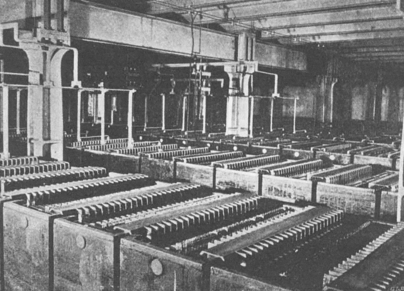 Brunkebergsverket, ackumulatorrummet